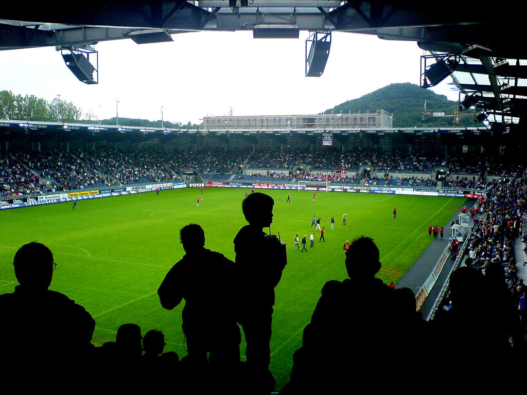 Viking FK vs. Fredrikstad FK at Viking Stadion